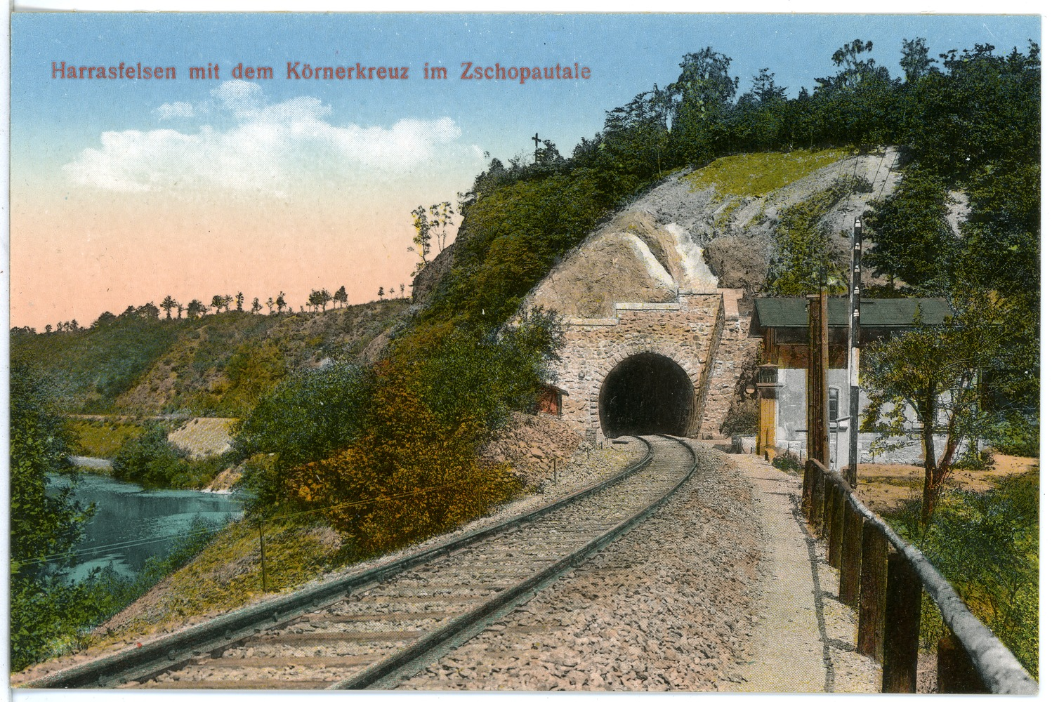 Zschopautal; Harrasfelsen mit Körnerkreuz und Eisenbahntunnel This postcard is from publisher Brück & Sohn in Meißen ( postcard has a unique number 19835 and is available in a higher resolution at the publisher. This images was uploaded in a cooperation project between Wikipedians and the publisher.